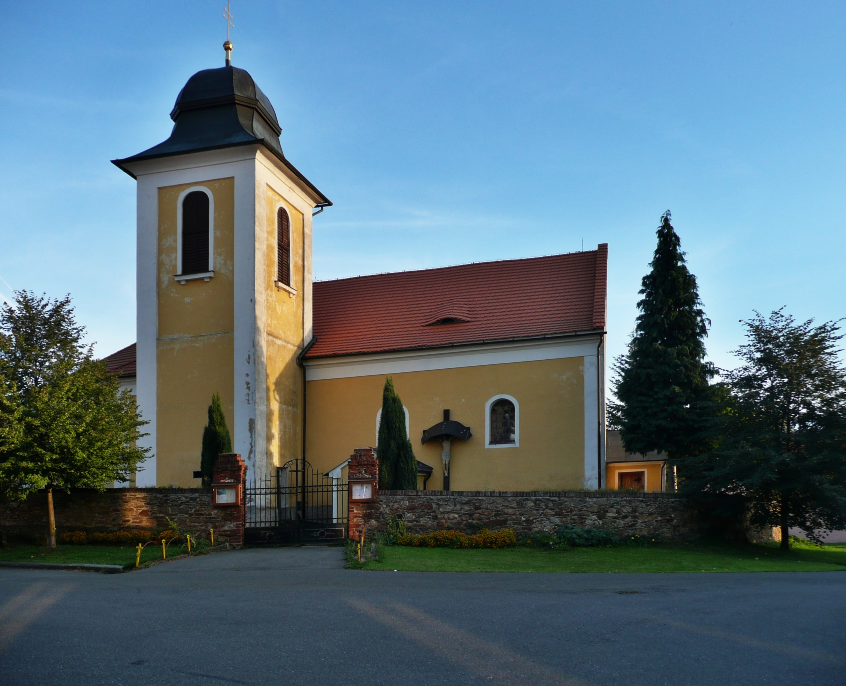 Kostel sv. Petra a Pavla (Zdislavice), náves, Zdislavice